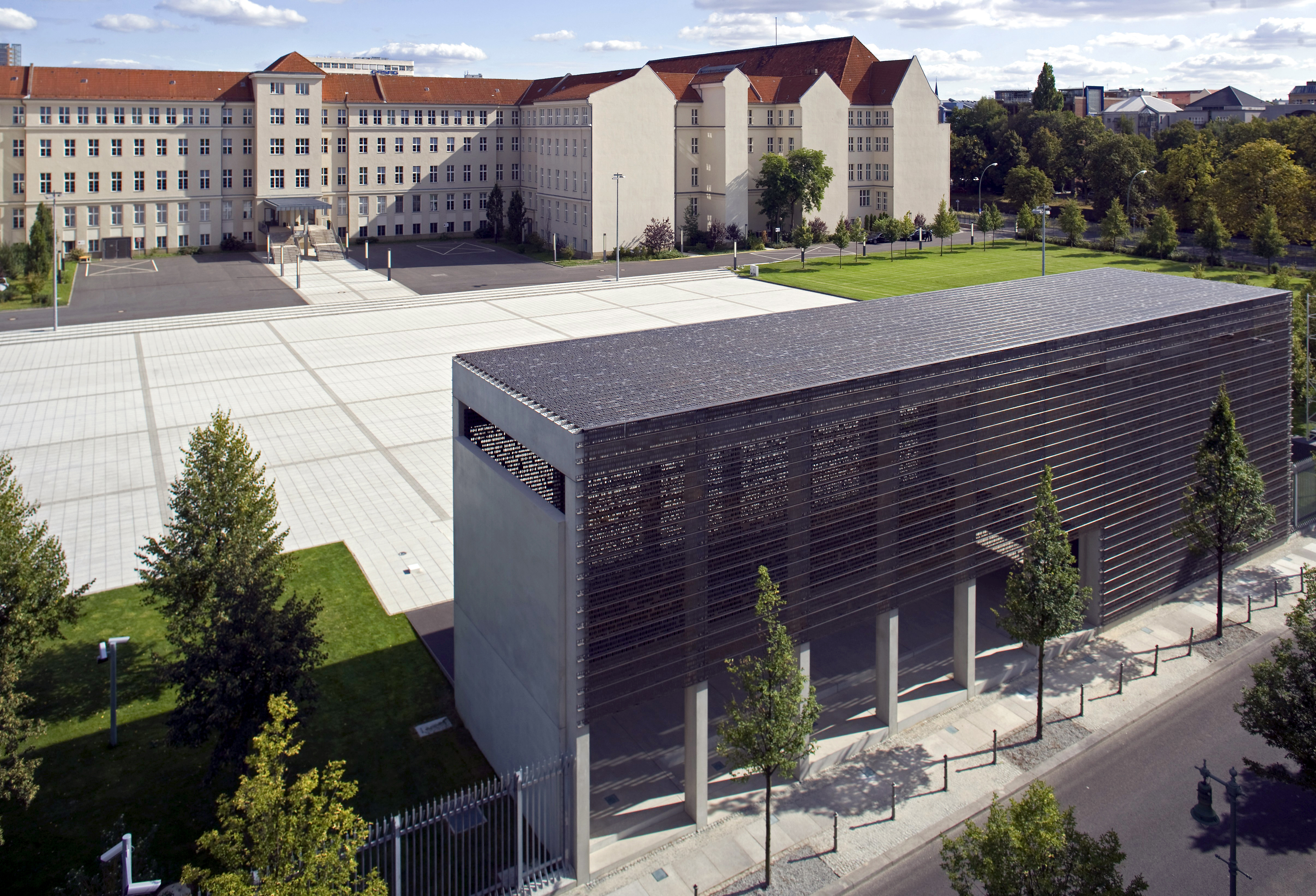 Das Ehrenmal der Bundeswehr. Auf dem Gelände des Zweiten Dienstsitzes des Bundesministeriums der Verteidigung, in Berlin, wurde ein Ehrenmal für Angehörige der Bundeswehr errichtet, die in Folge der Ausübung ihrer Dienstpflichten für die Bundesrepublik Deutschland ihr Leben verloren haben. ©Bundeswehr/Bienert